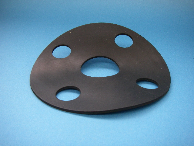 rubberseet